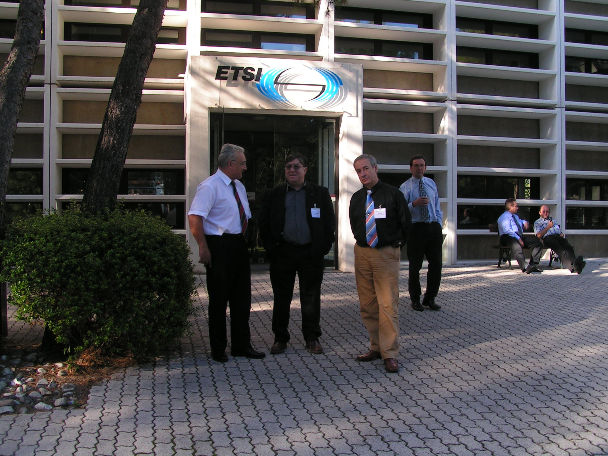 Edgard rosello (centre) Oscar Espallargas(droite) Ministre Belgique(ar droite)